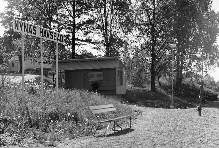 Nynäs havsbad hållplats